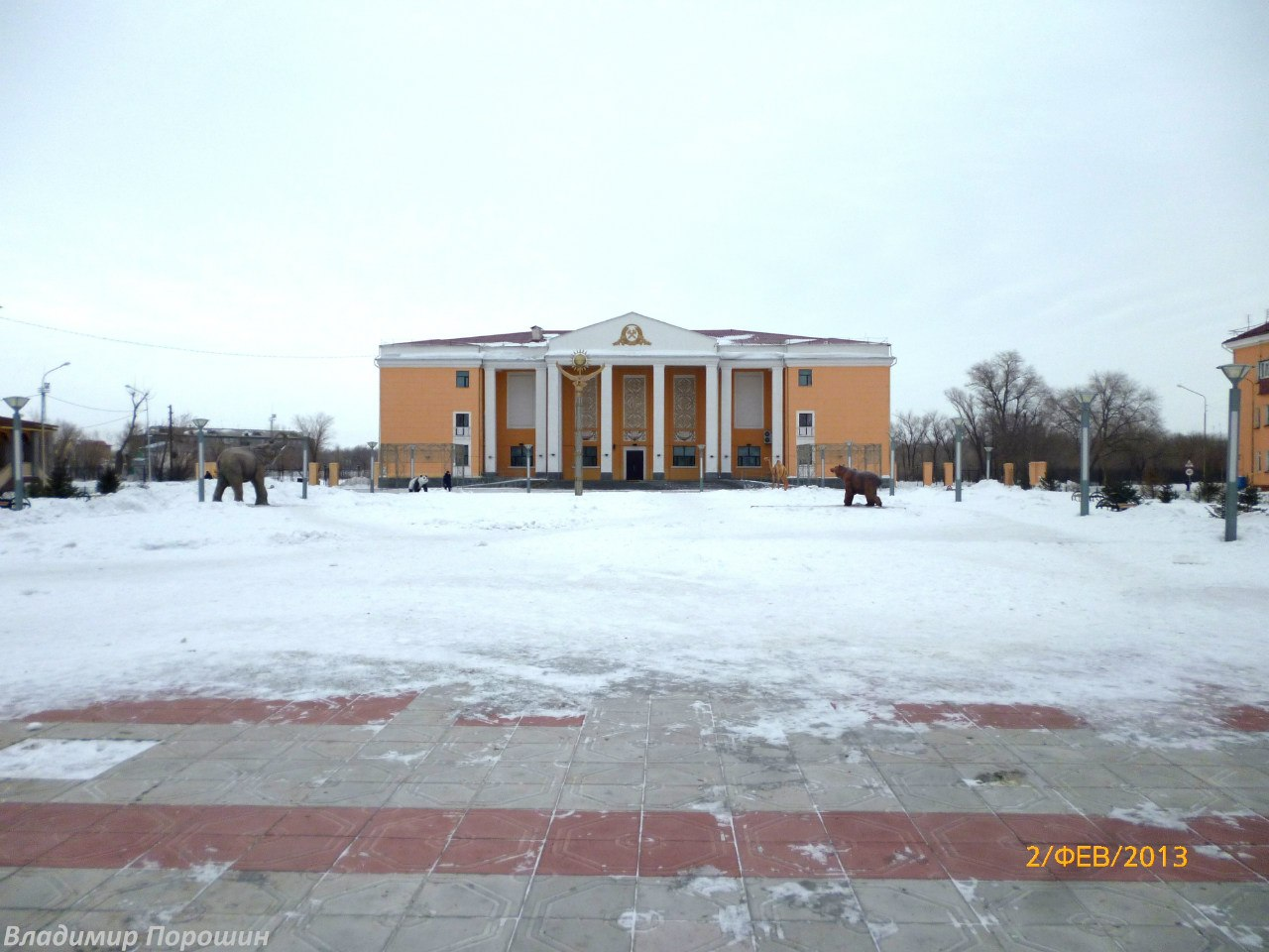 Прогулка с фотоаппаратом по родному городу